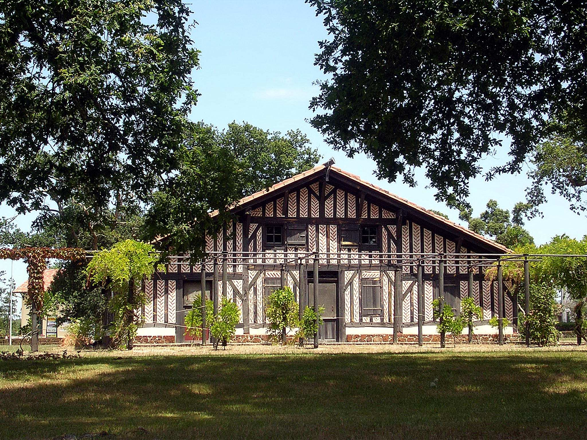 Maison de l'airial de Bias, dans le département français des Landes